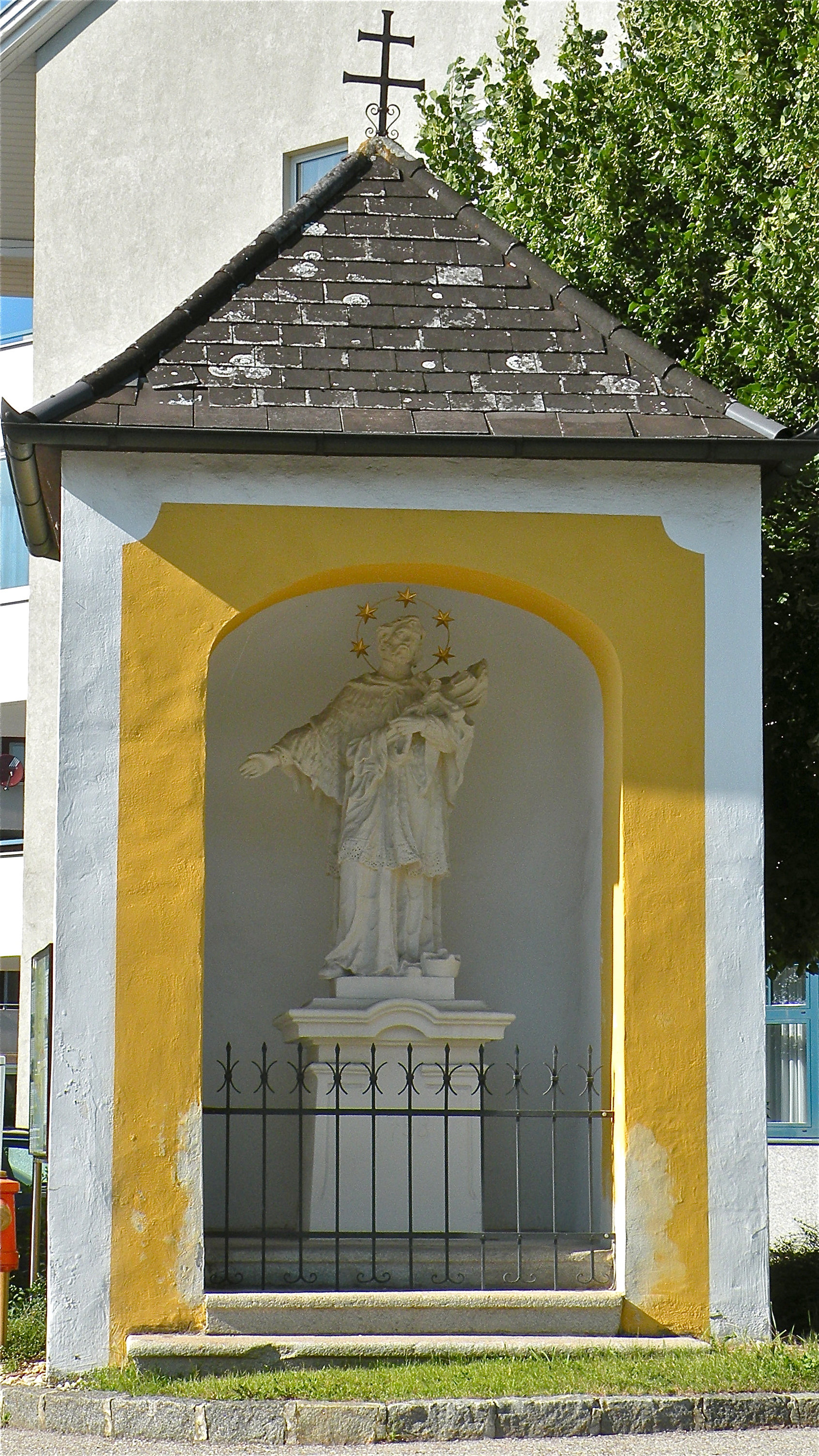 Nepomukkapelle in Luftenberg im Bezirk Perg in Oberösterreich